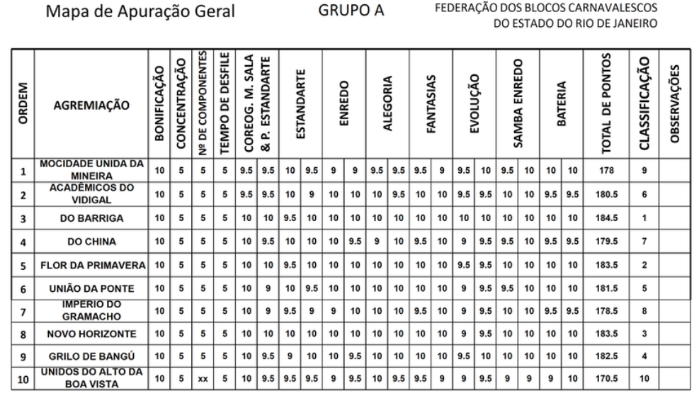 FBCERJ - 2019 - Grupo A